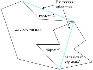 Иллюстрация к теореме Эрдёша-Наги